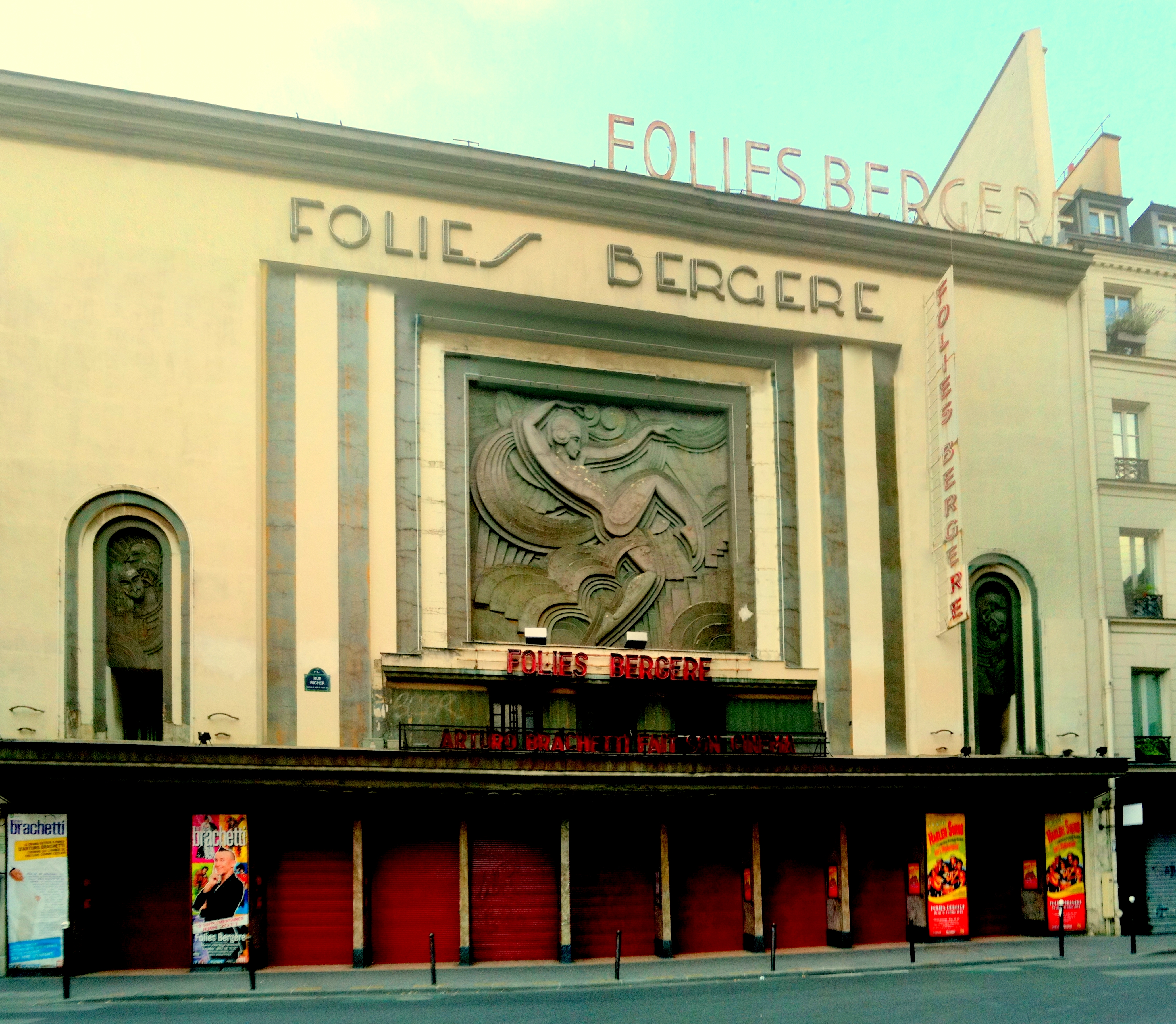 Follies Bergere